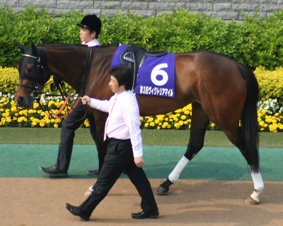 エイジアンウインズ（東京競馬場）